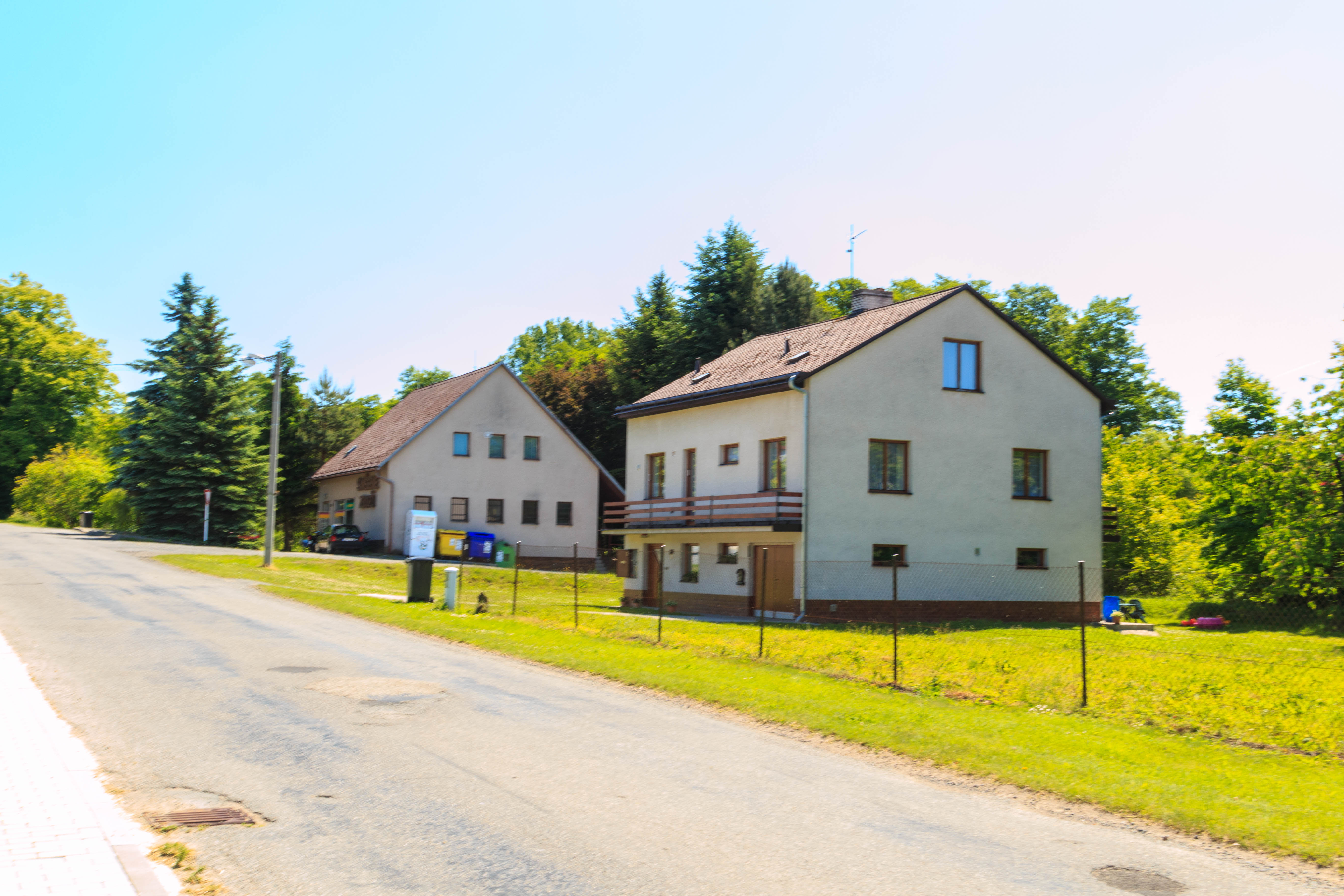 Podmoklany čp. 34